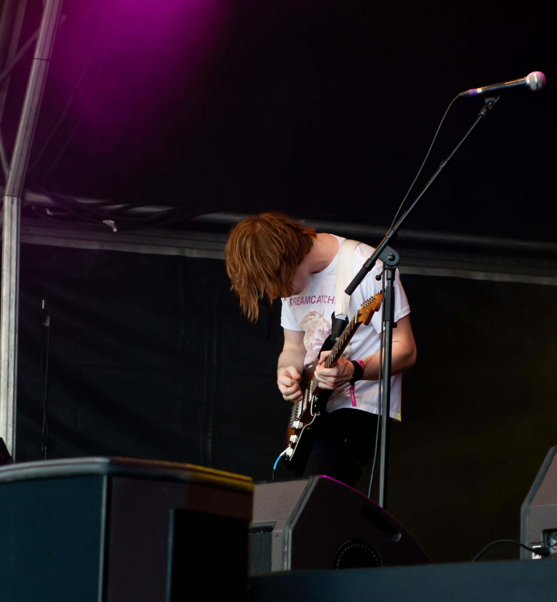 Emeralds